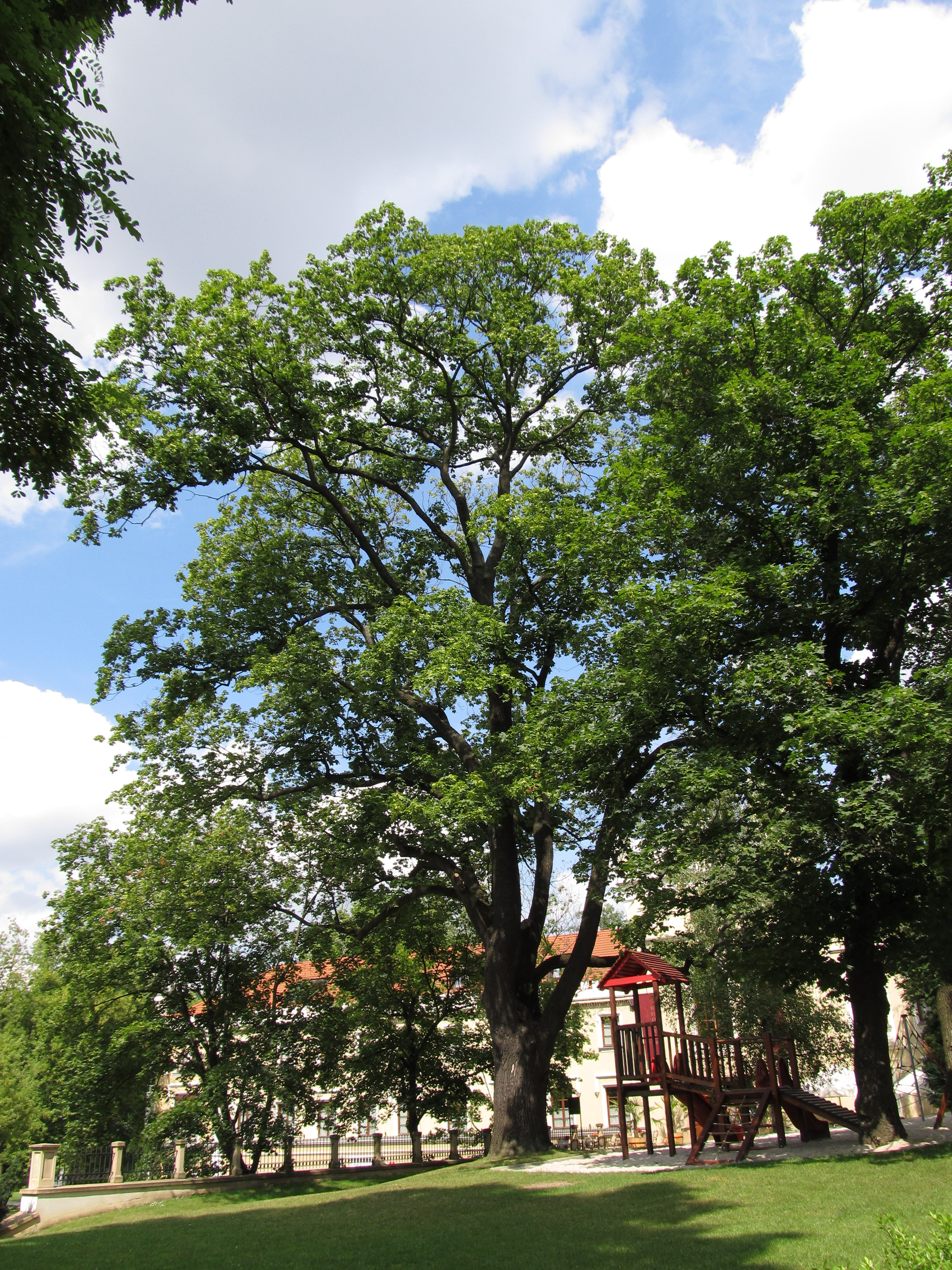 Památný strom - Javor mléč u zámečku v Krčském lese